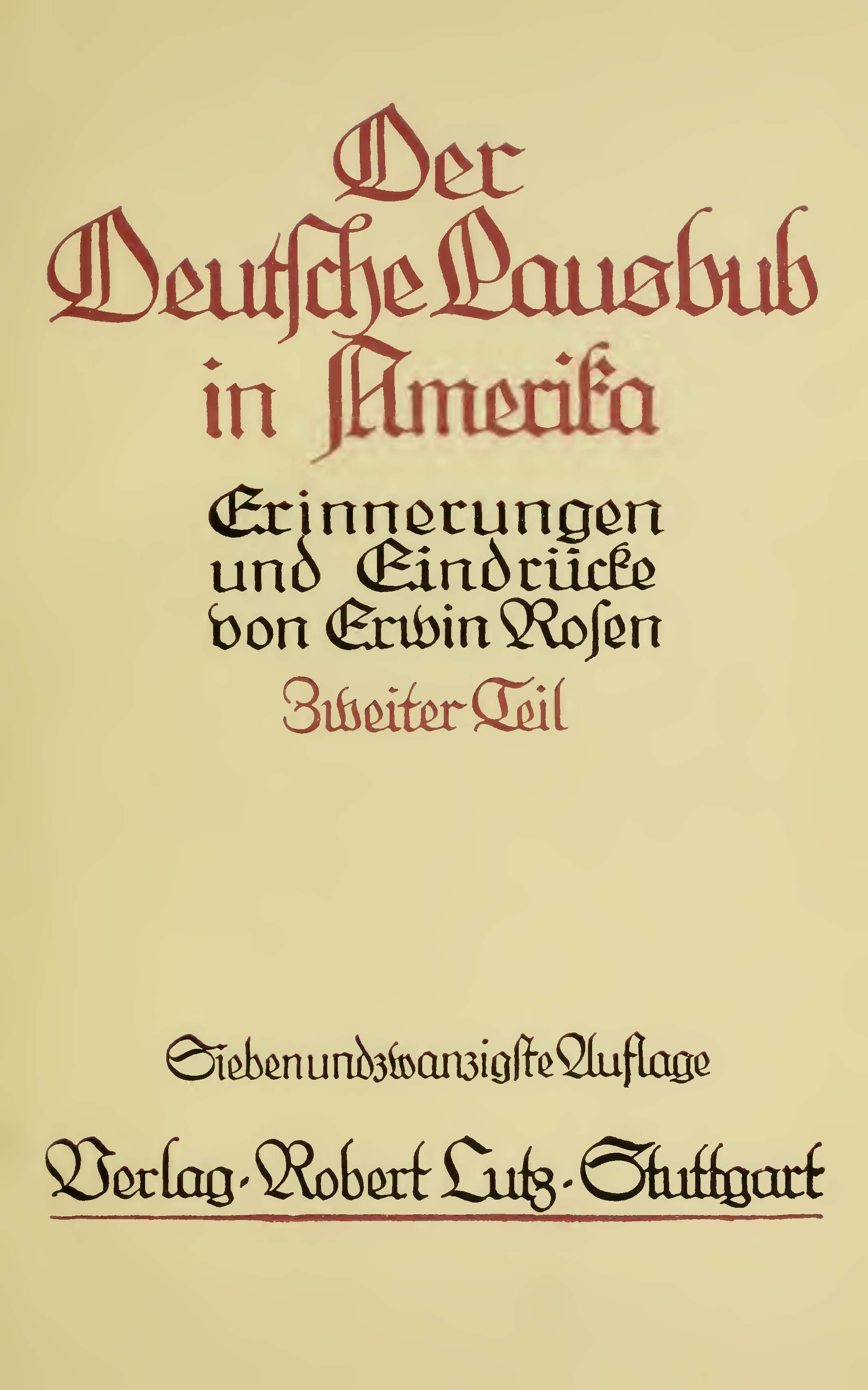 Titelblatt von Erwin Rosen: Der deutsche Lausbub in Amerika : Erinnerungen und Eindrücke, Teil 2, Stuttgart : Verlag Robert Lutz, 1912.